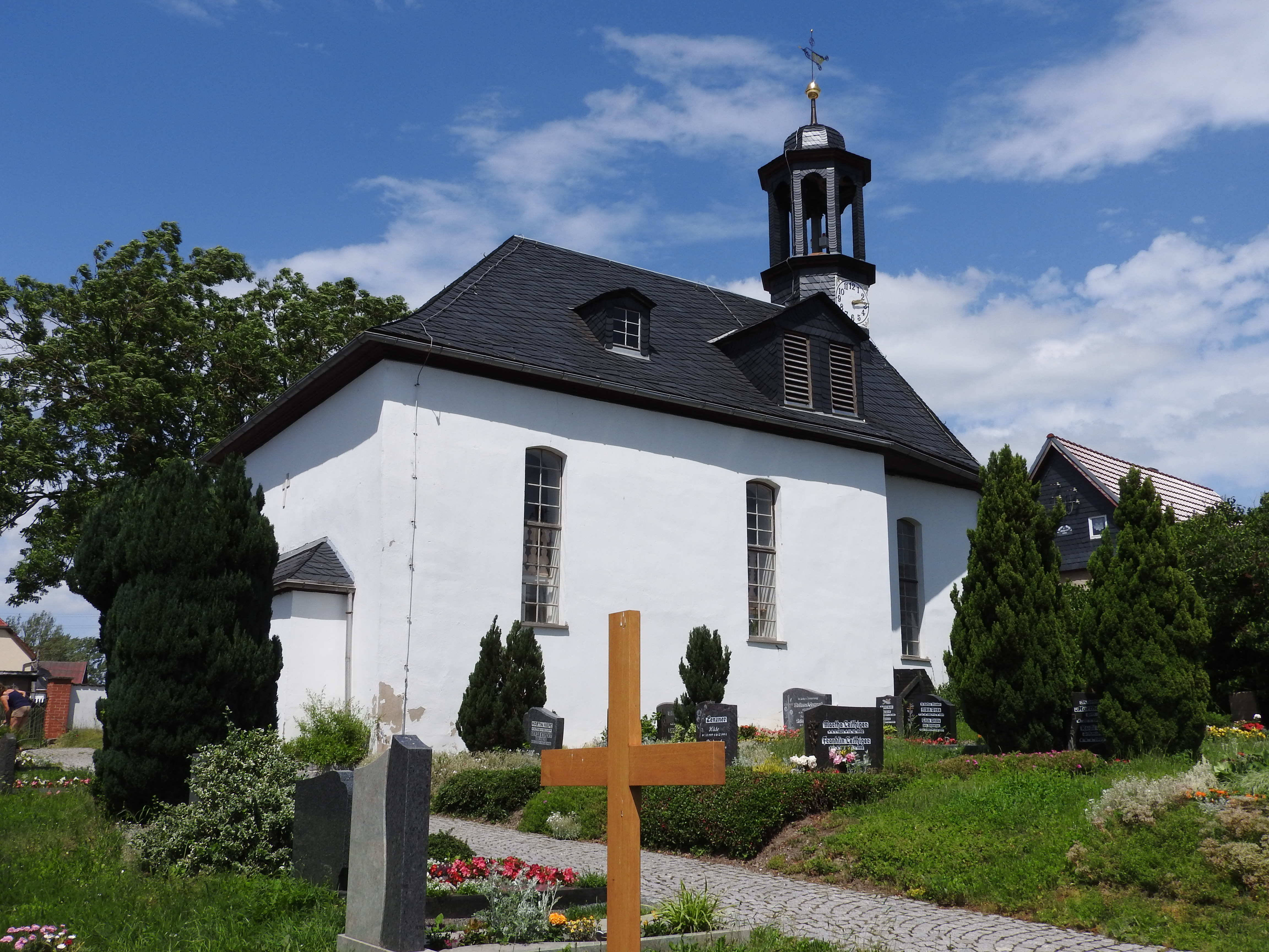 Kirche von Neundorf bei Schleiz, Thüringen